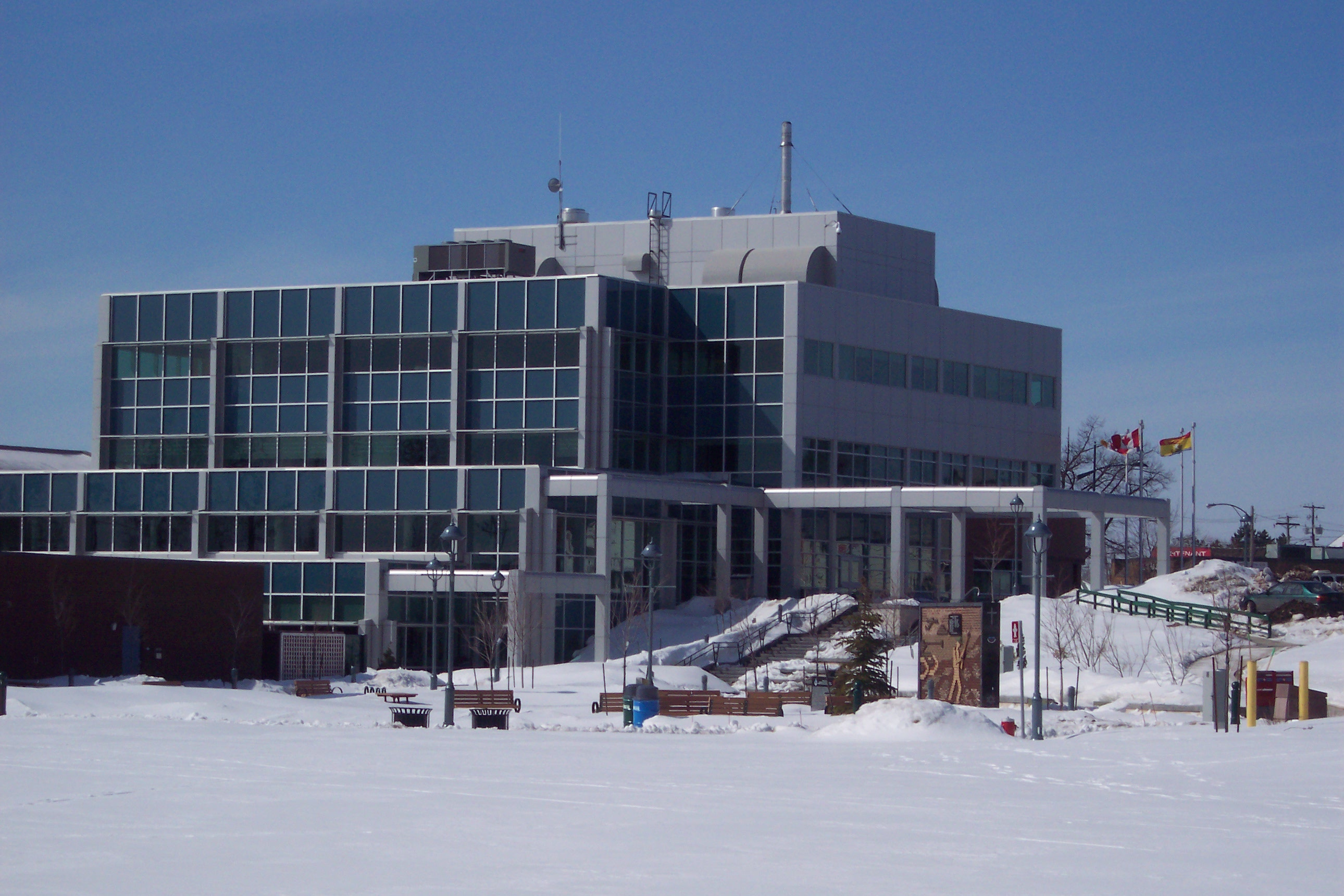 Hôtel de ville de Dieppe, Canada